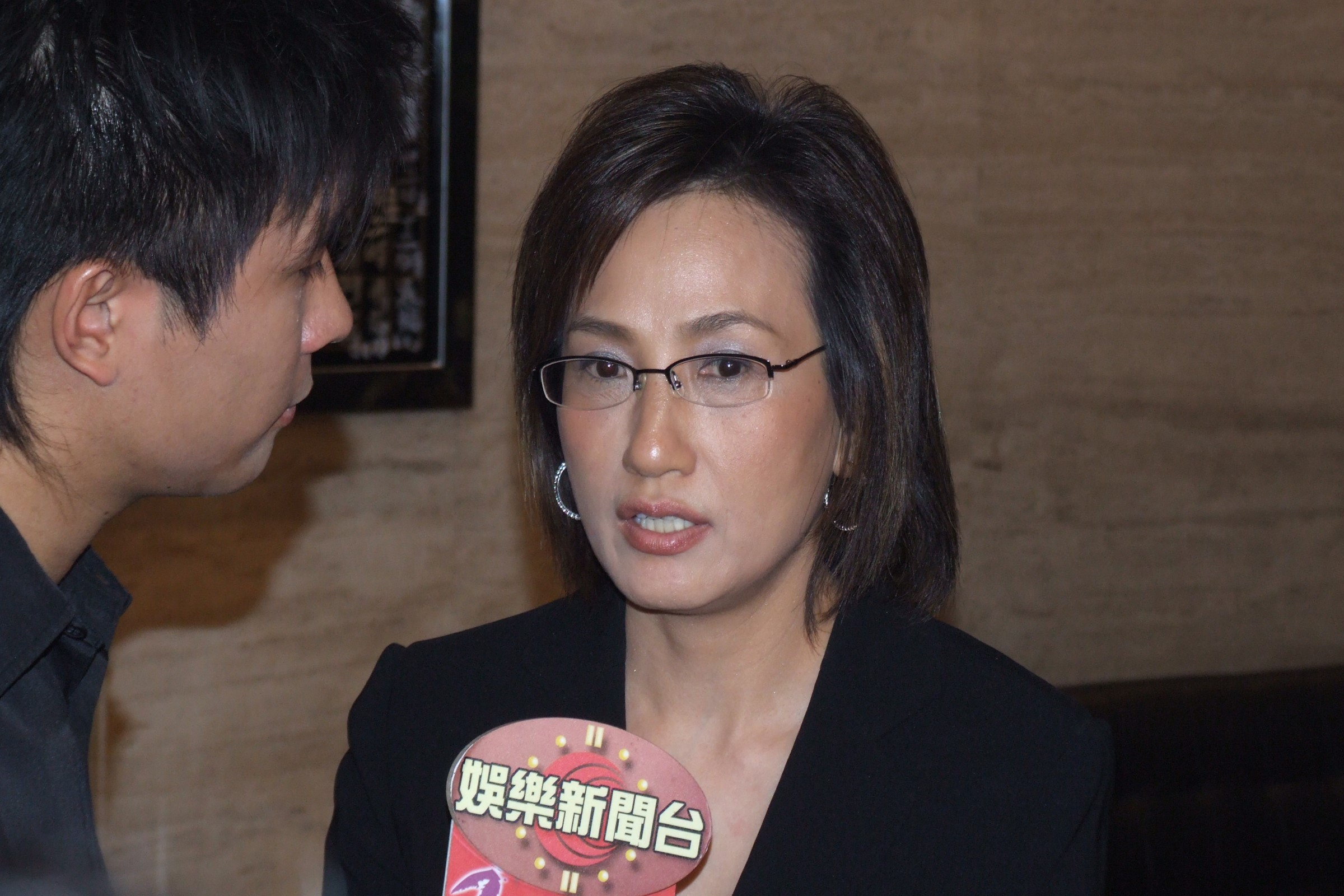 中文（香港）: 出席伍晃榮喪禮的前無綫新聞記者葉雅媛接受有線娛樂新聞台訪問